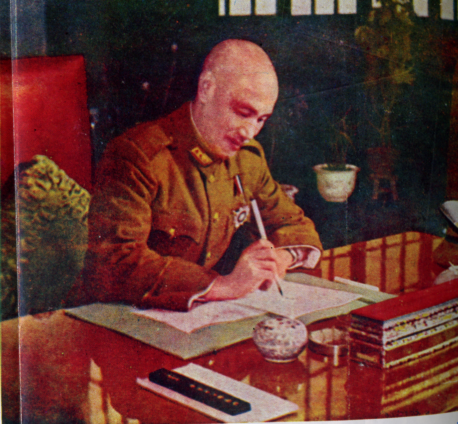 中文（中国大陆）: 中华民国国民政府主席蒋中正签署颁布《中华民国宪法》，宣布国家进入宪政时期。